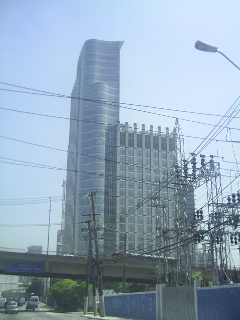 Sede do Bank Boston em São Paulo.